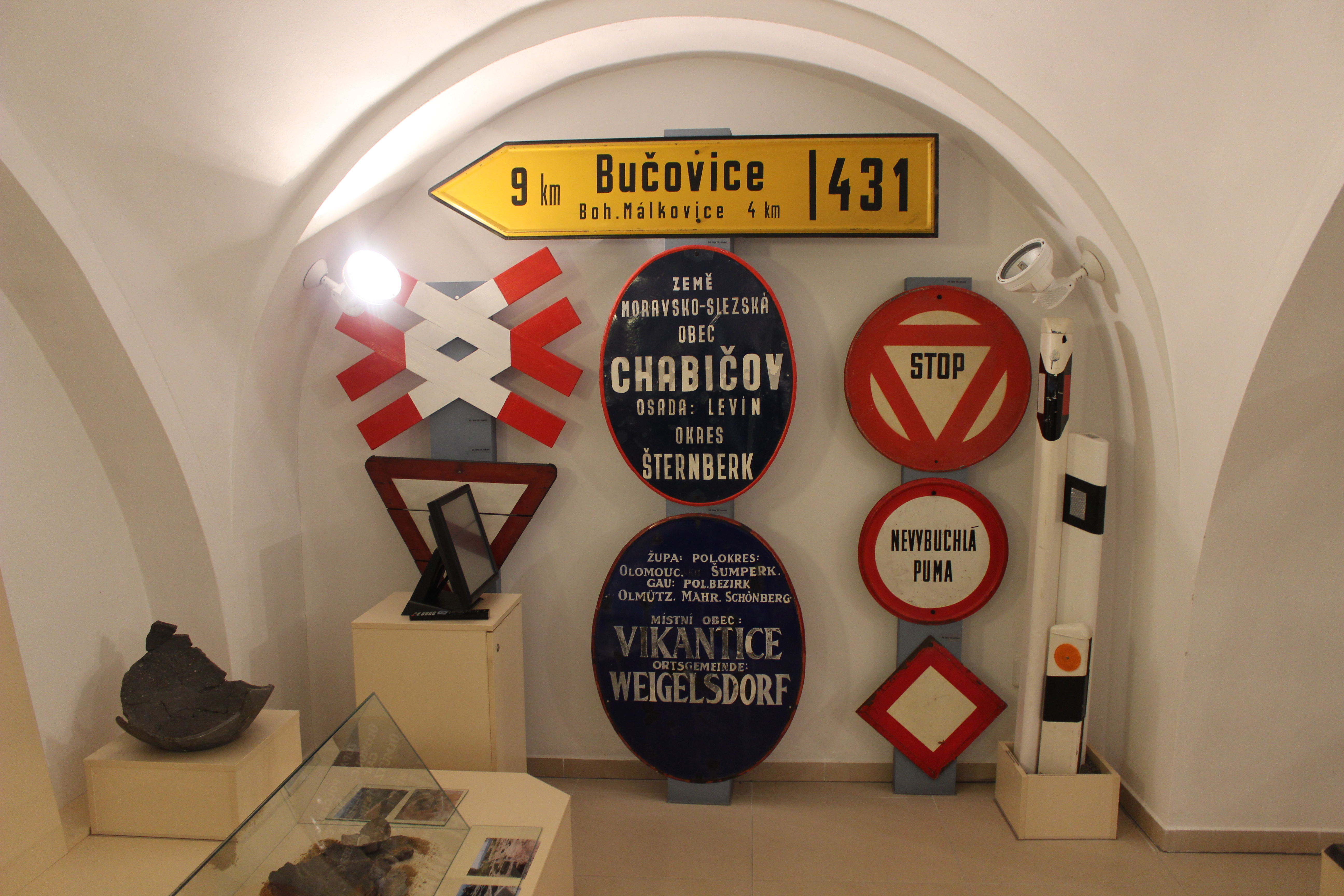 Exponát vystavený v Muzeu silnic ve Vikýřovicích.